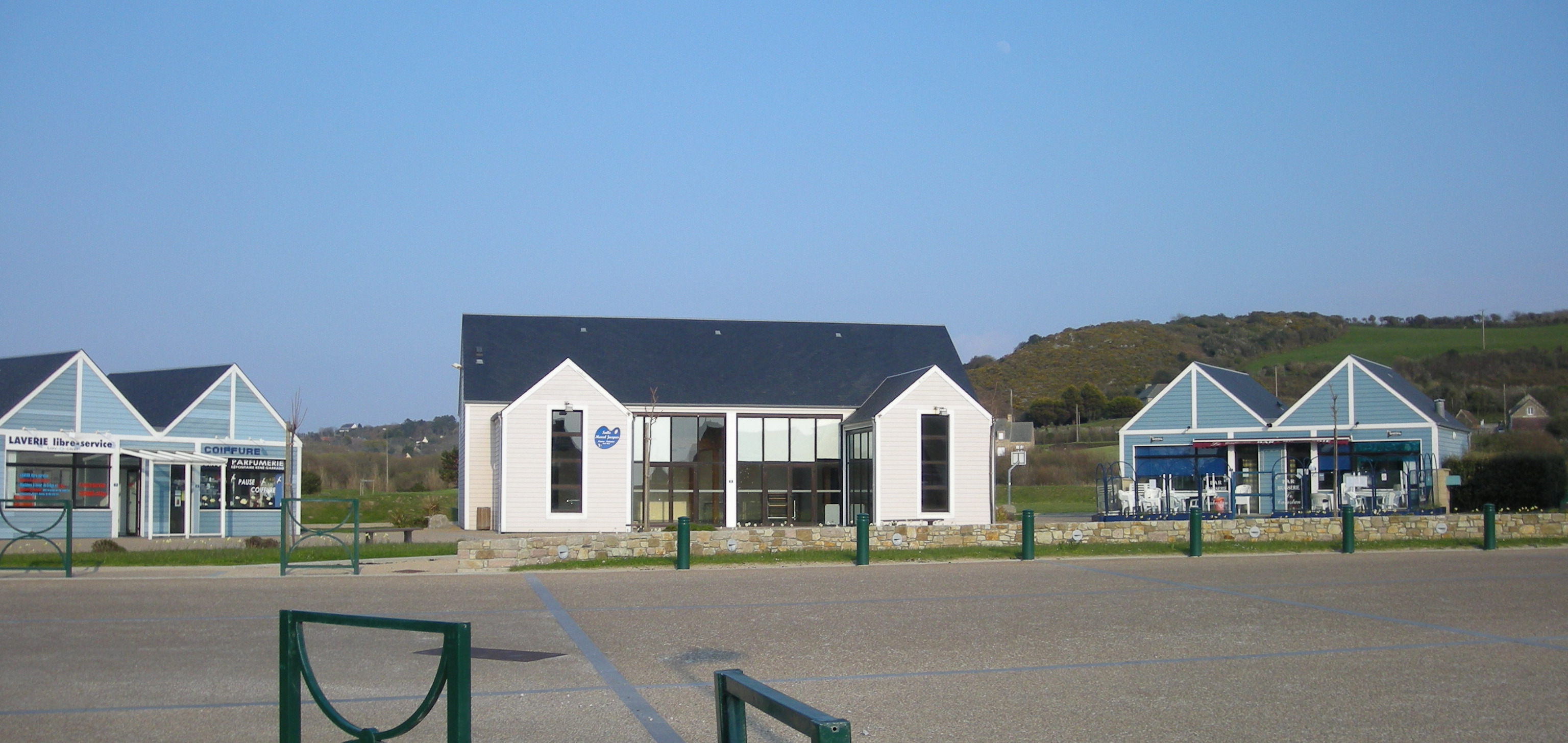 La place des Tamaris à Siouville-Hague (Manche, Normandie, France)